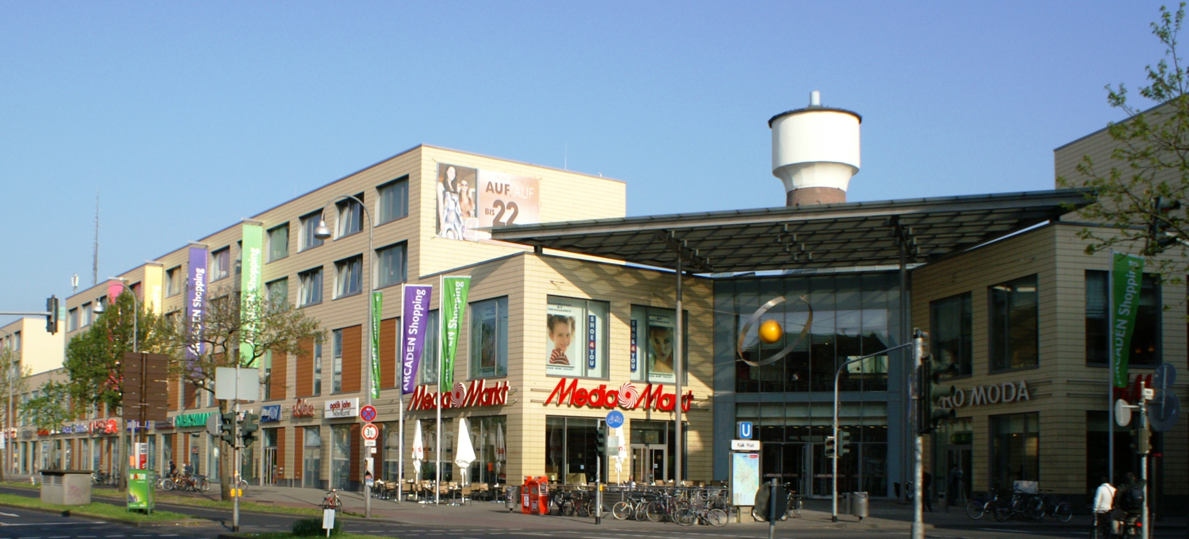 Köln Arcaden in Köln-Kalk. Mittig in den Komplex integriert der denkmalgeschützte Wasserturm der stillgelegten Chemischen Fabrik Kalk.